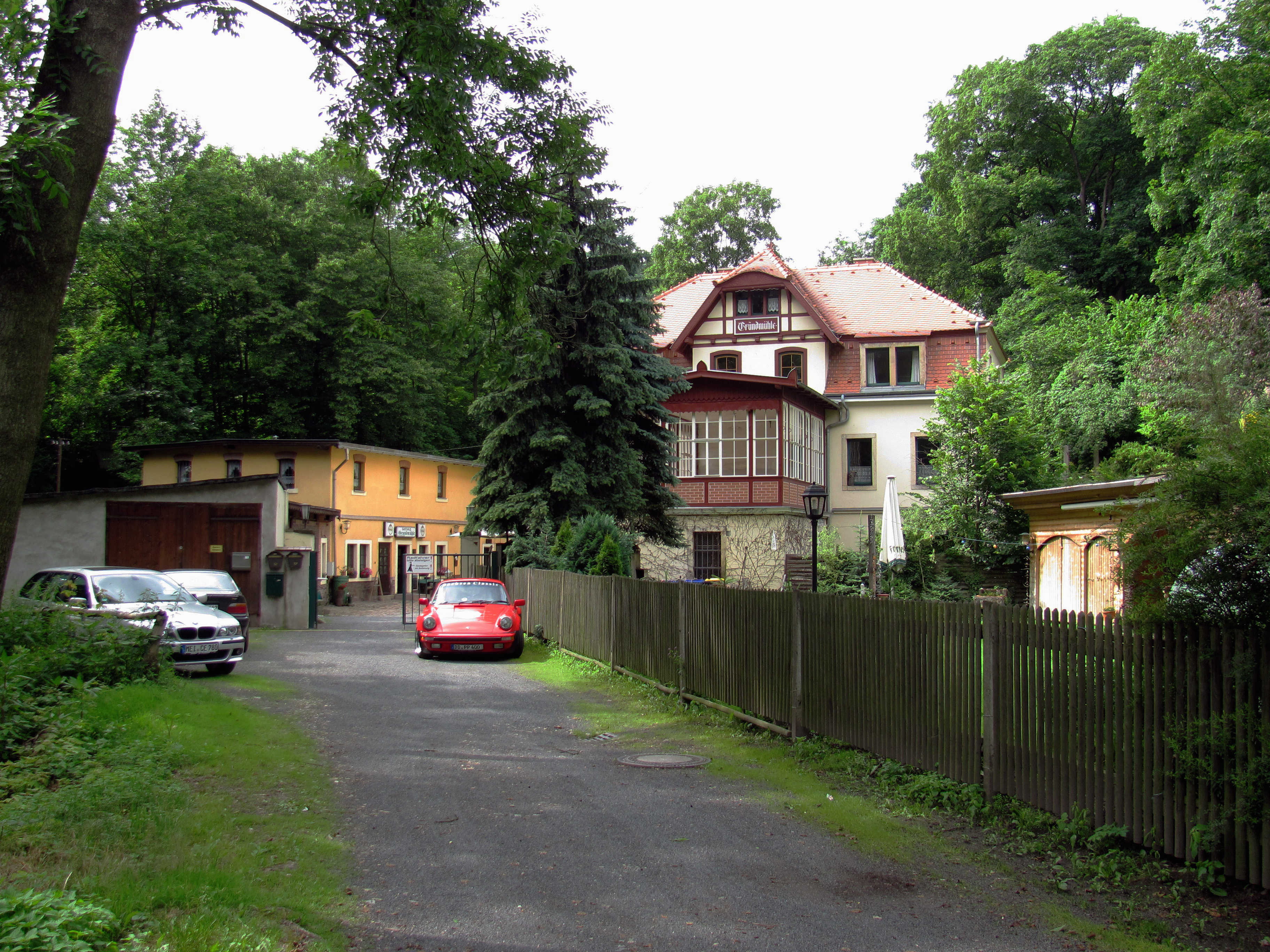 Ehemaliges Restaurant Grundmühle im Lößnitzgrund